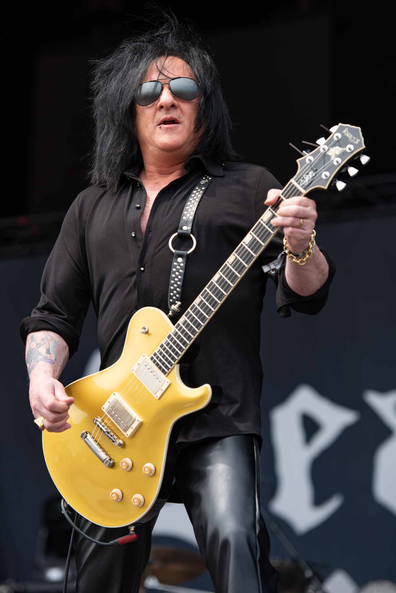 ARGO-Konzerte,Deadland Ritual,Konzert,Livekonzert,Livemusik,Musik,RiP,Rock im Park 2019,Steve Stevens,Zeppelin Stage